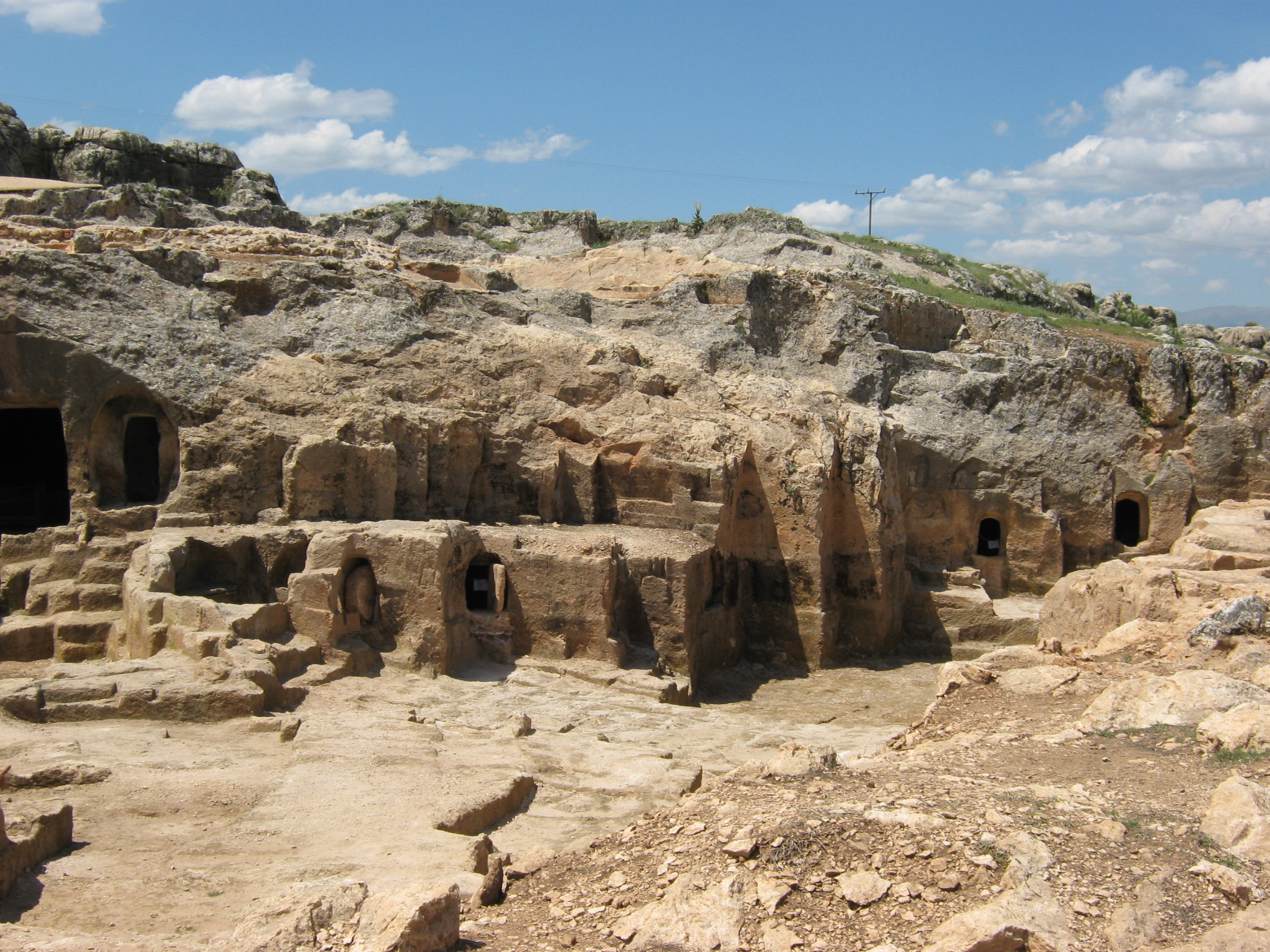 Römische Gräber bei Cayönü